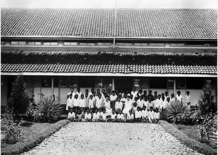 Foto "Kartinischool" (Sekolah Kartini) untuk anak perempuan di Malang, Jawa Timur.